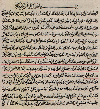 الصفحة الثانية من فصل الخطاب في تحريف كتاب رب الأرباب